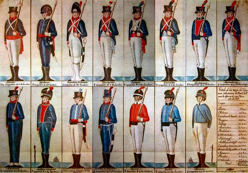 Lamina de Doldan representado los batallones que defendieron Buenos Aires del Invasor Iglés en 1806 y 1807.